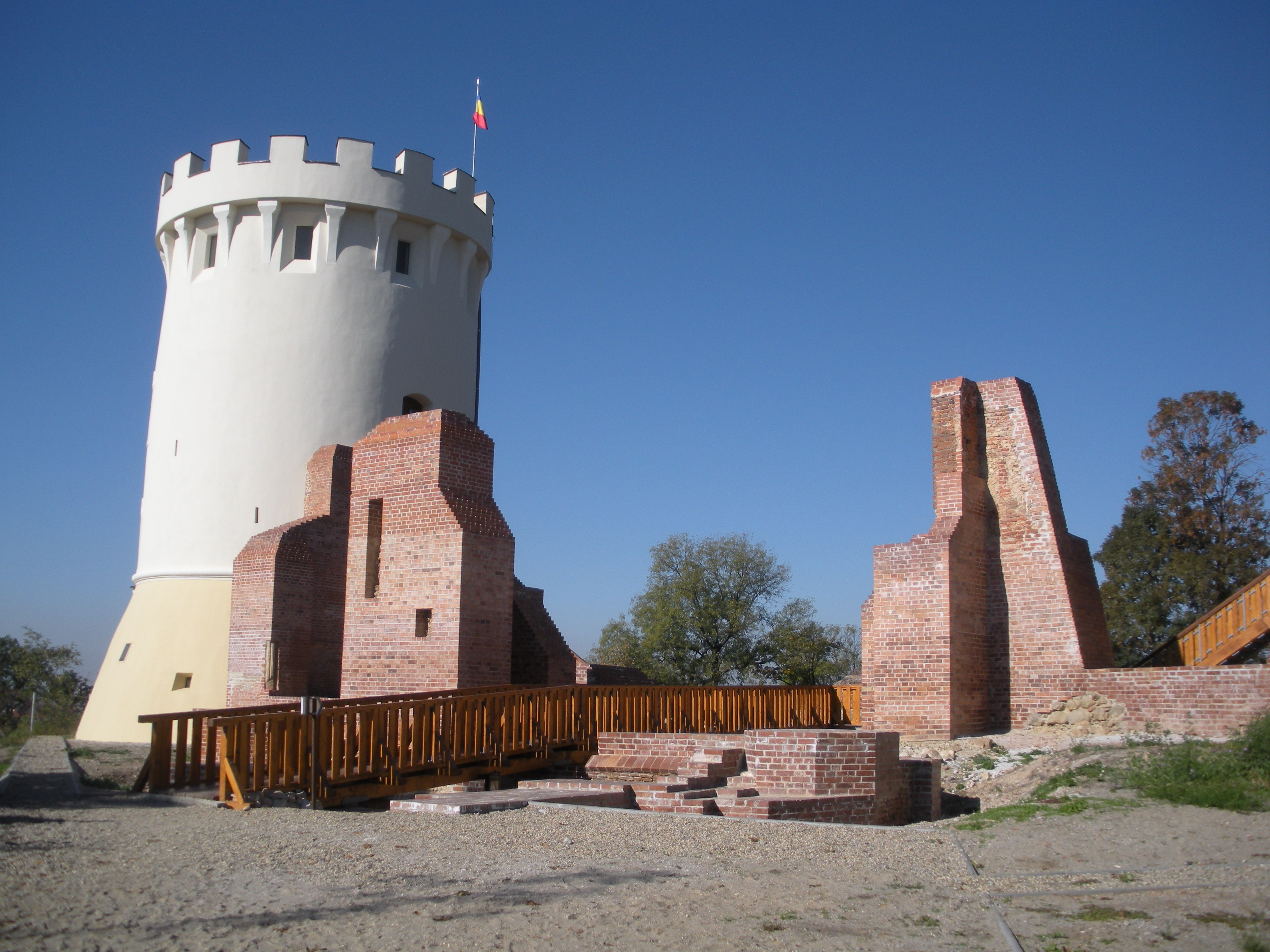 Erdőd (Románia) várkastélya 2012. októberében.